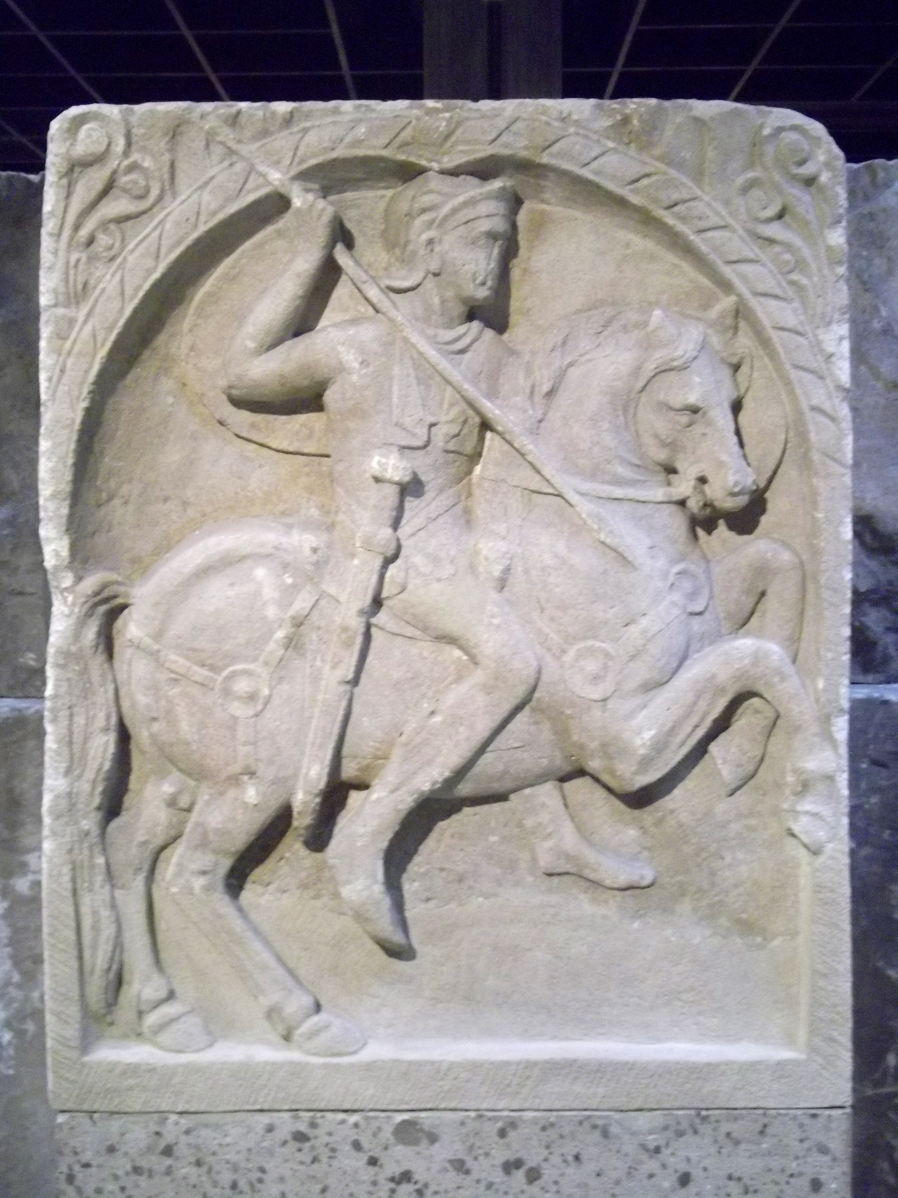 Römisch-Germanisches Museum (RGM) Köln: Grabstein eines Römischen Reiters Datierung: 2. Hälfte des 1. Jahrhunderts n. Chr. FO: Köln